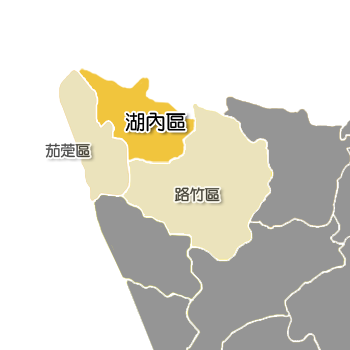 湖內區相對位置